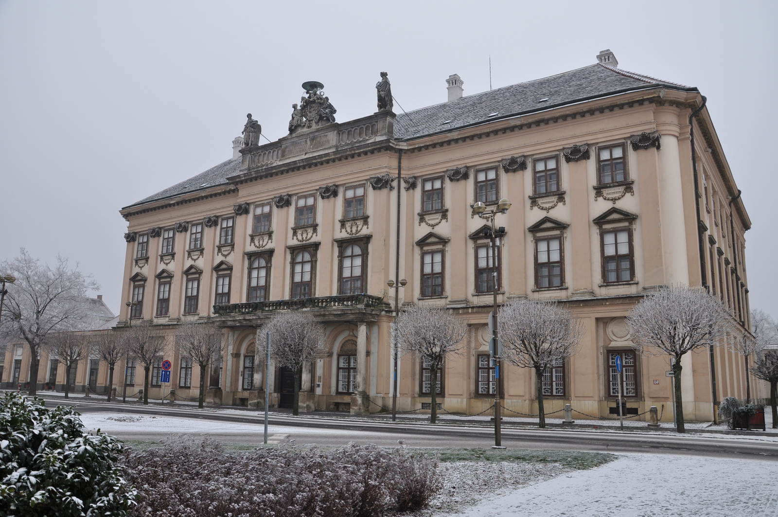 Püspöki palota (Szombathely, Berzsenyi Dániel tér 3.) This is a photo of a monument in Hungary, Identifier: 9377